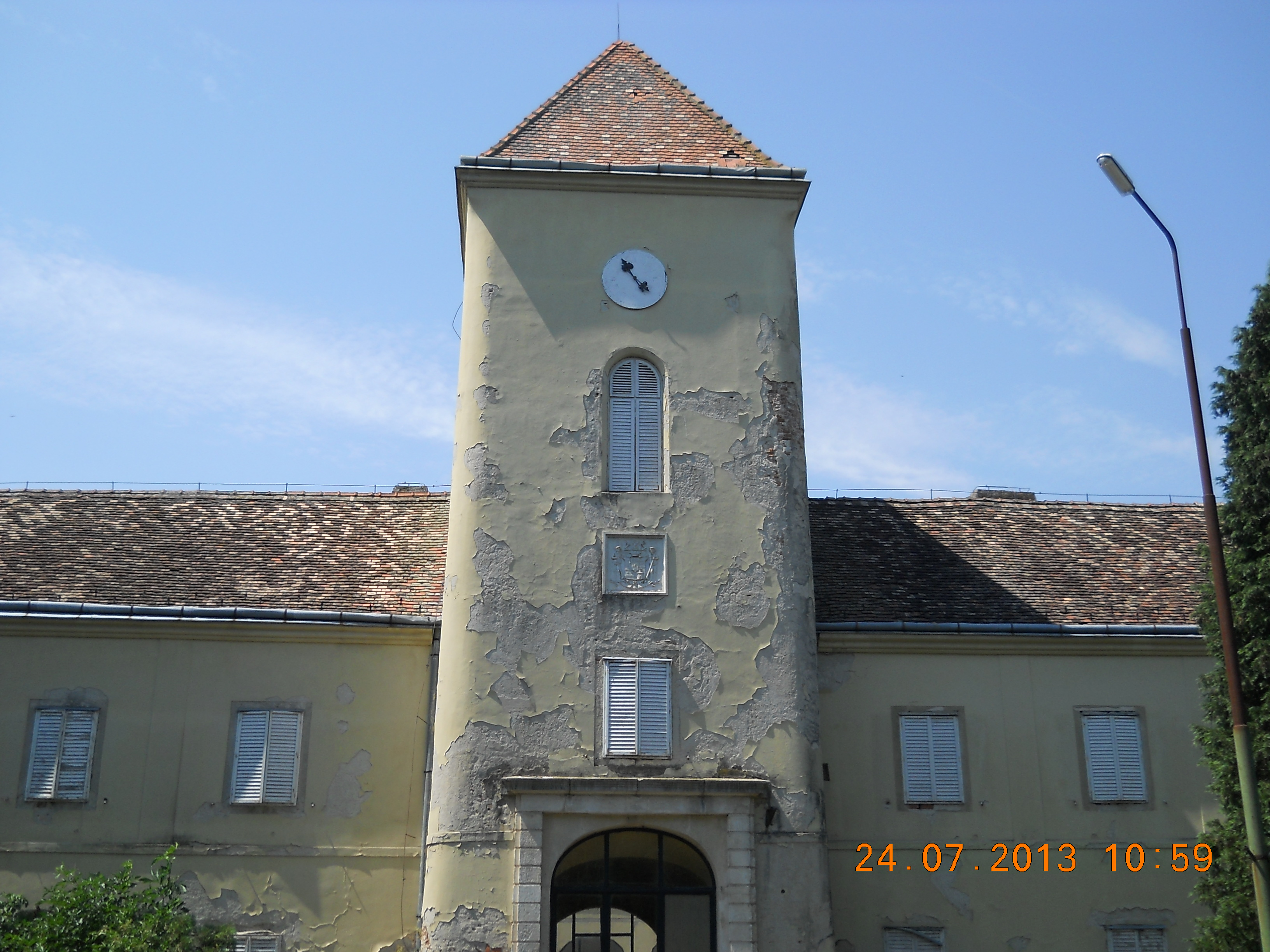 Erdődy-kastély This is a photo of a monument in Hungary. Identifier: 9512